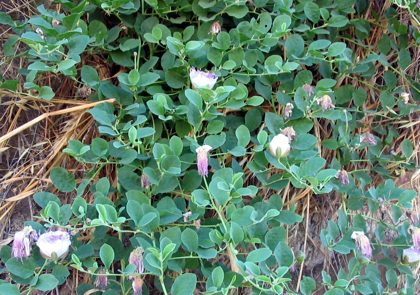 Fotografía digital realizada por Pablo Alberto Salguero Quiles a un ejemplar de 150 cm de diámetro, en este caso, el ejemplar está colgando por la simple orografía del suelo. Normalmente son postrados llegando a veces a formar una rueda de no más de 15 cm de alto pero con diámetros de más de 4 m. La foto está tomada en Jaén (España) donde se cultiva esporadicamente, tanto por sus frutos como por los capullos florales, antes de que se abran. La recolección no es fácil pues tiene unas espinas agudisimas, de ahí el nombre binominal.